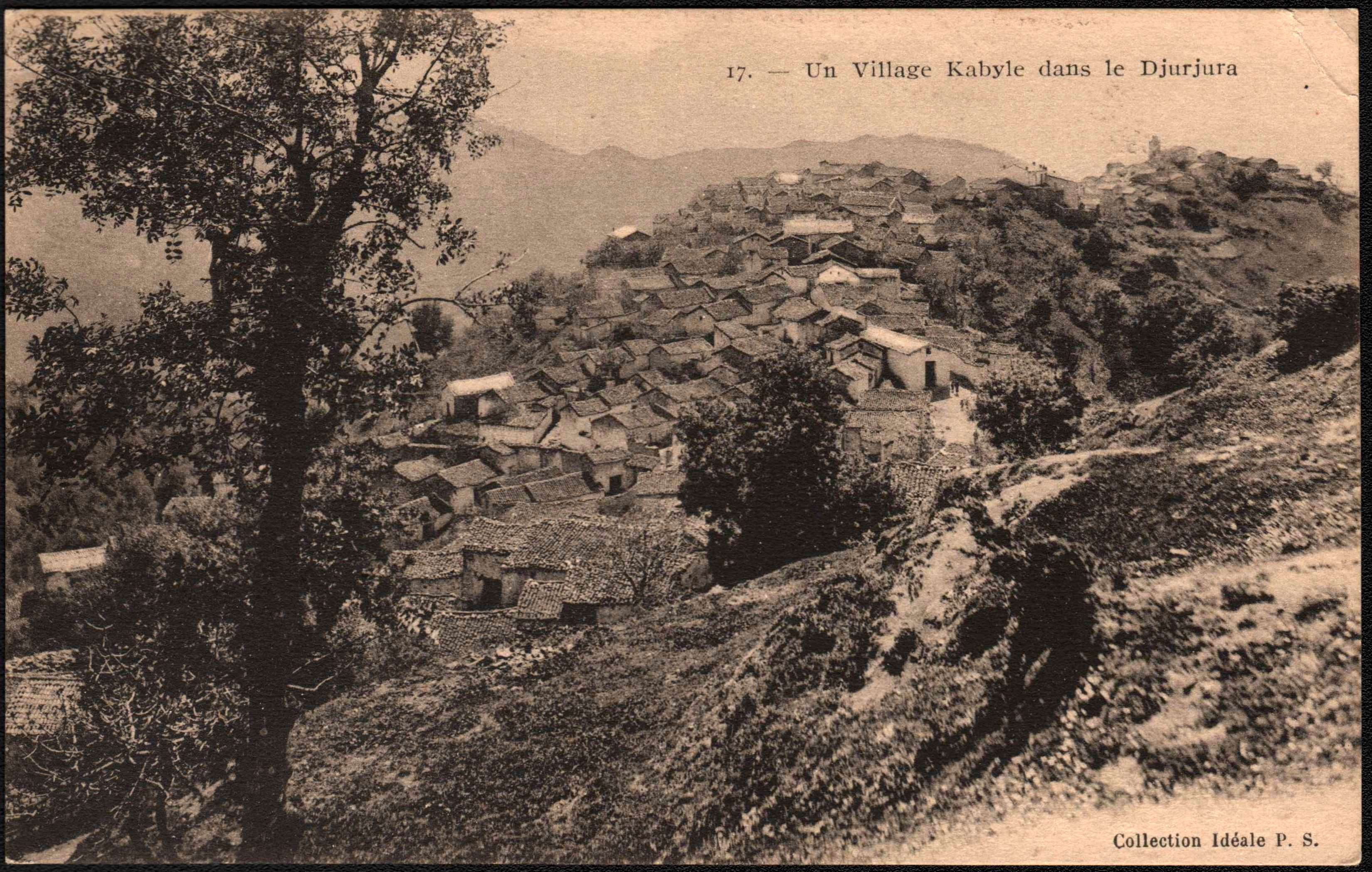 17. Un Vilage Kabyle dans le Djurjura Collection Idéale P.S.